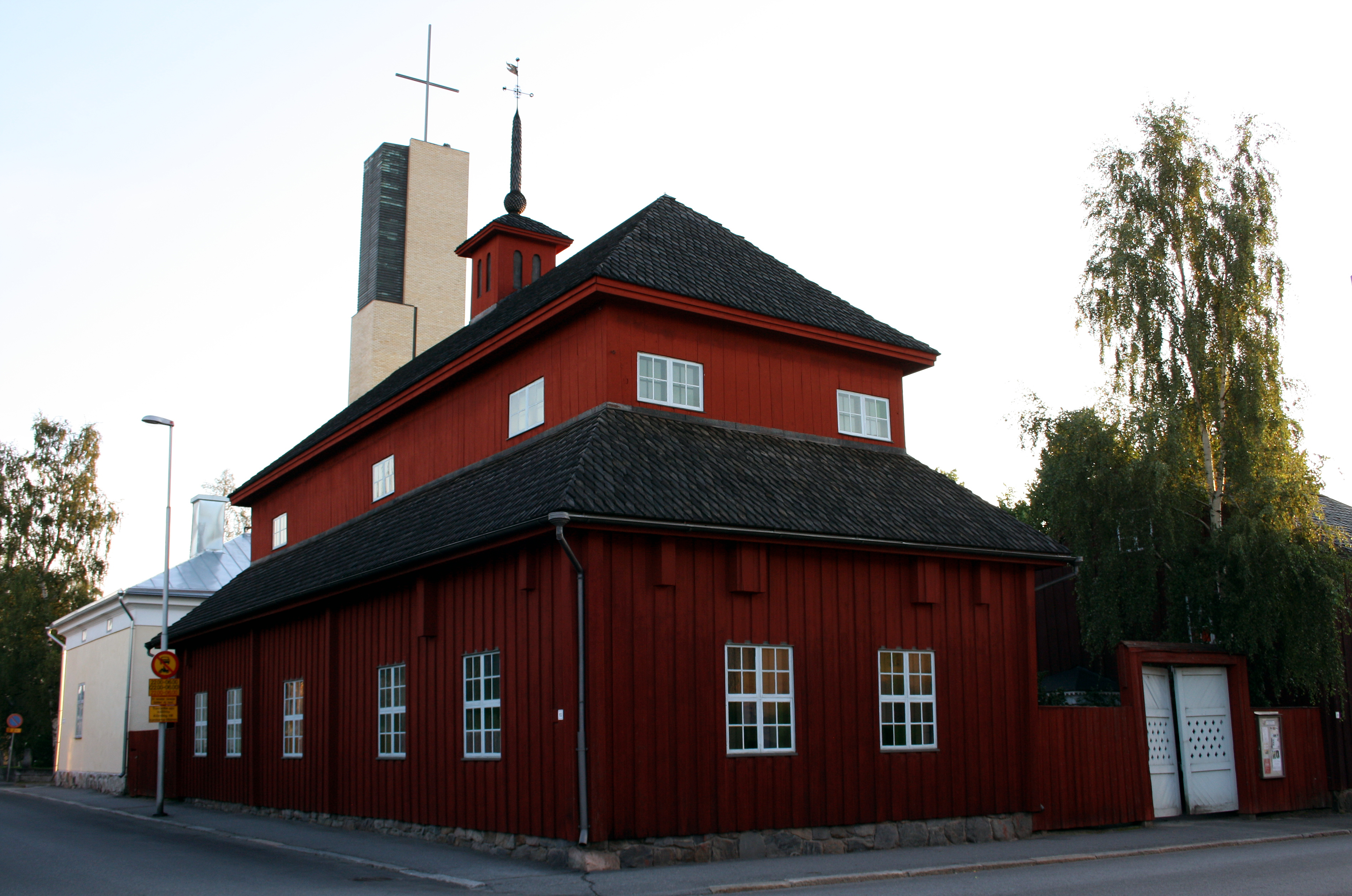 K.H. Renlundin museoon kuuluva entinen koulurakennus, pedagogio, vuodelta 1696.